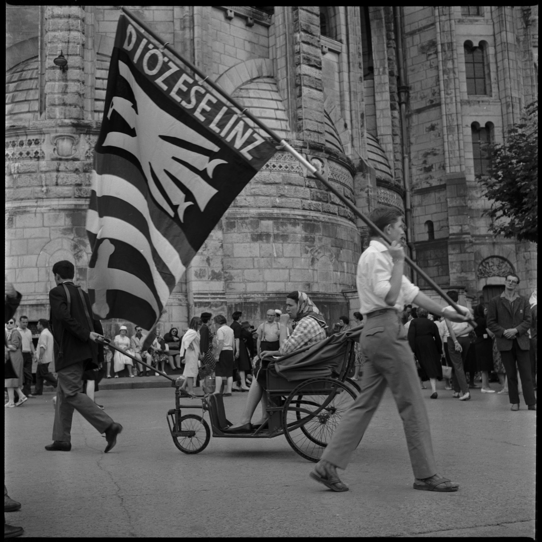 Lourdes (Hautes-Pyrénées). Août 1964. Vue de plusieurs personnes circulant dans le sanctuaire de Lourdes. Observation: Photographie réalisée pour l'ouvrage de André Rimailho, "Quelqu'un à Lourdes" publié en juin 1965 aux Editions du Centurion.